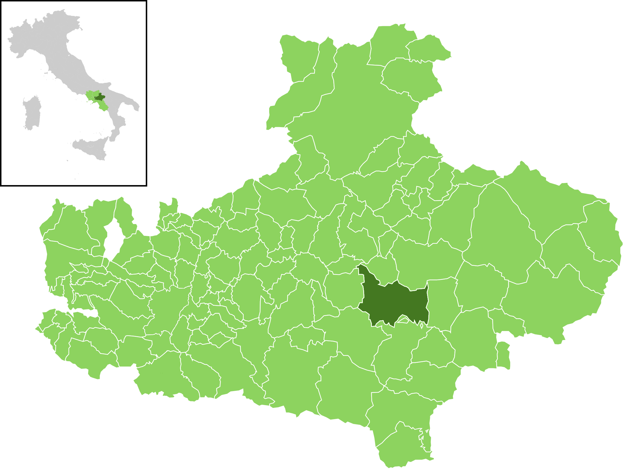 Posizione del comune all'interno della provincia di Avellino